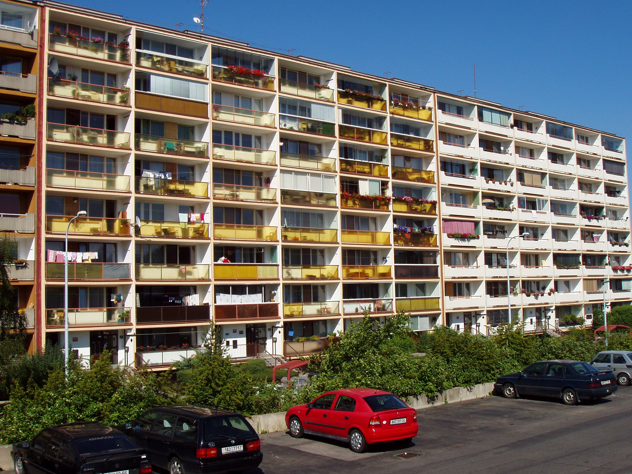 Praha-Stodůlky, sídliště Lužiny. Panelový dům, Píškova 1946/12 až 1941/2.